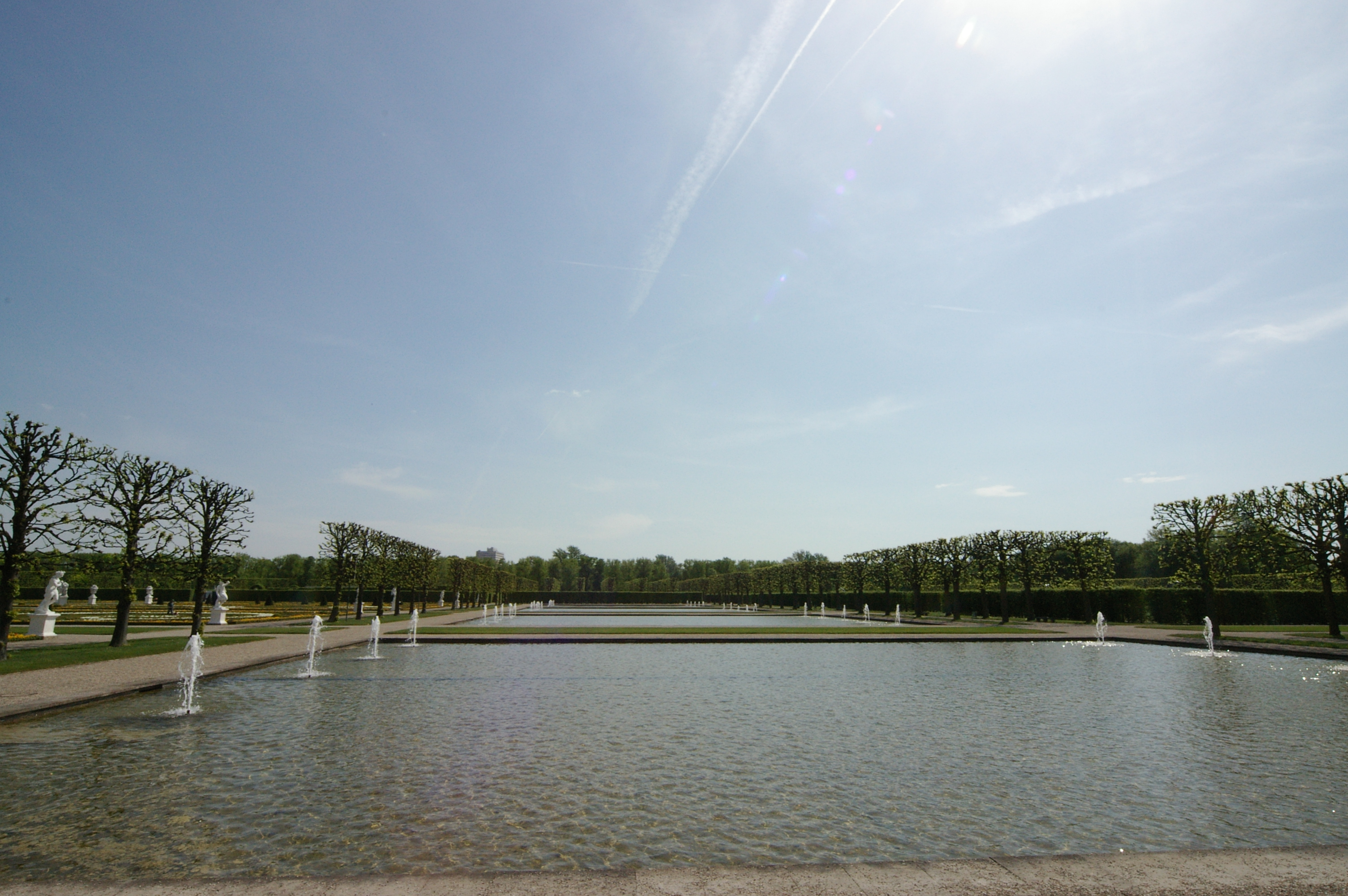 Hannover - Herrenhausen - Großer Garten - Schwanenteiche. 2005-05-02